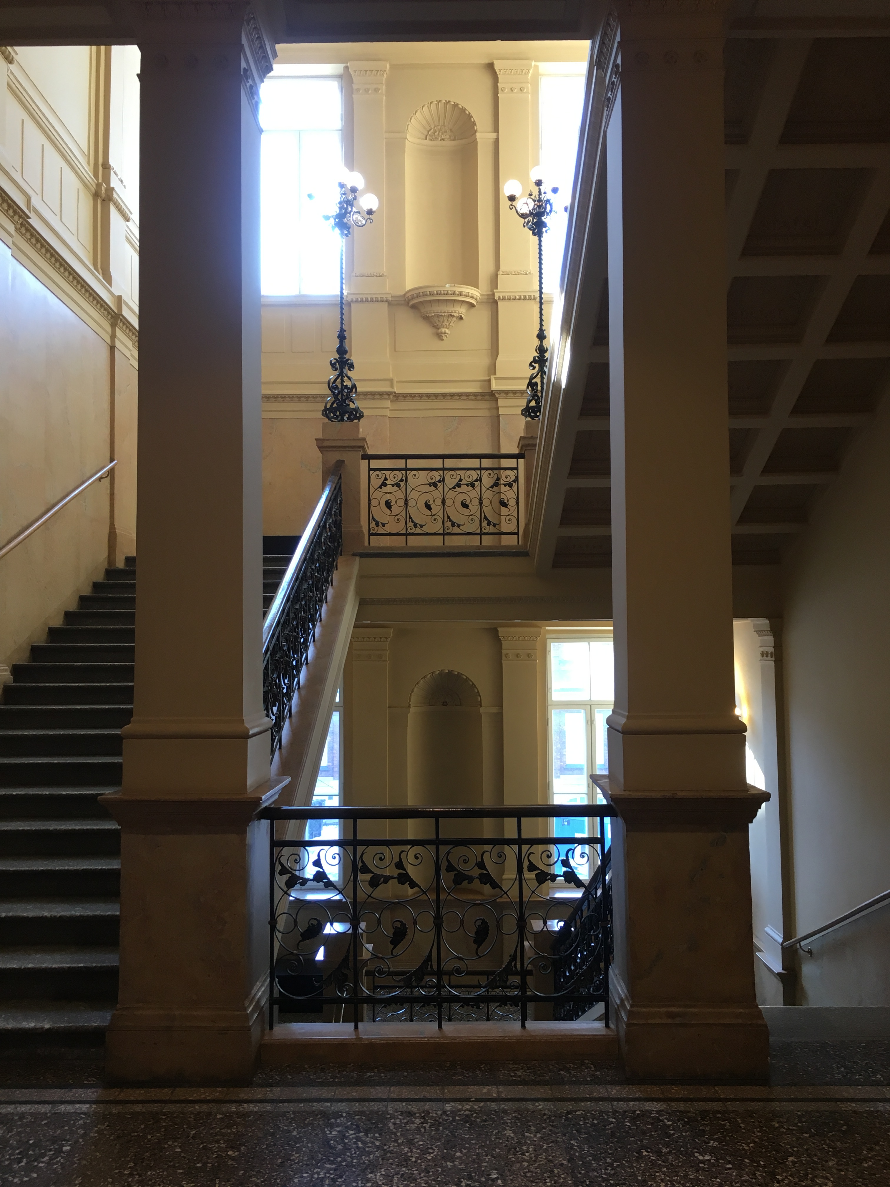 Suomen arkkitehtuurimuseo